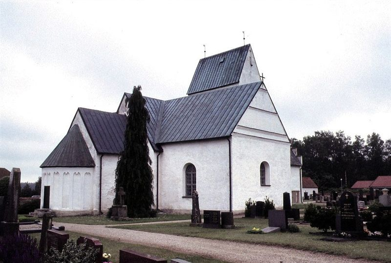 Köpinge kyrka i Skåne, Sverige. Köpinge kirke